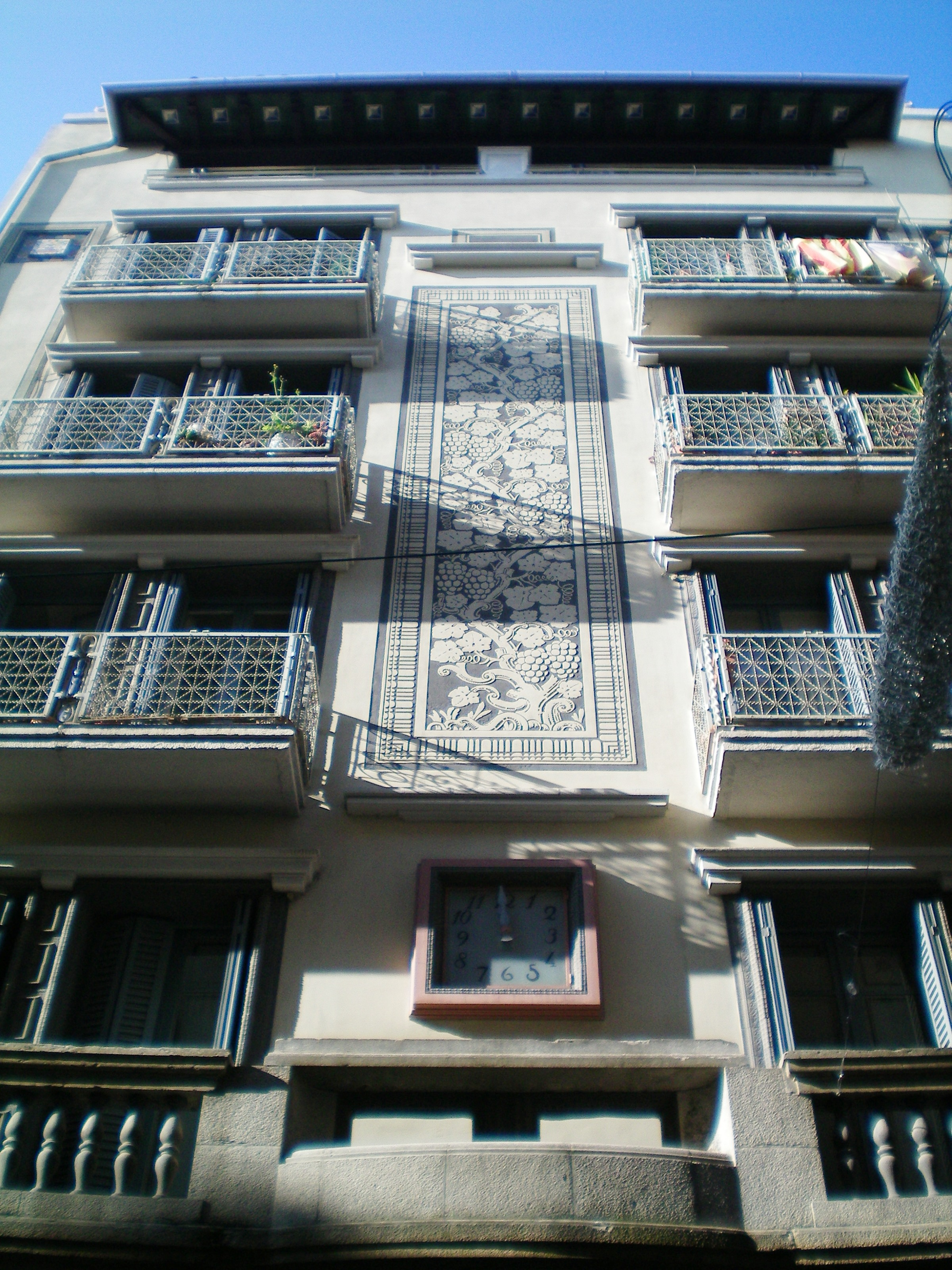 Casa cots. 5 pisos